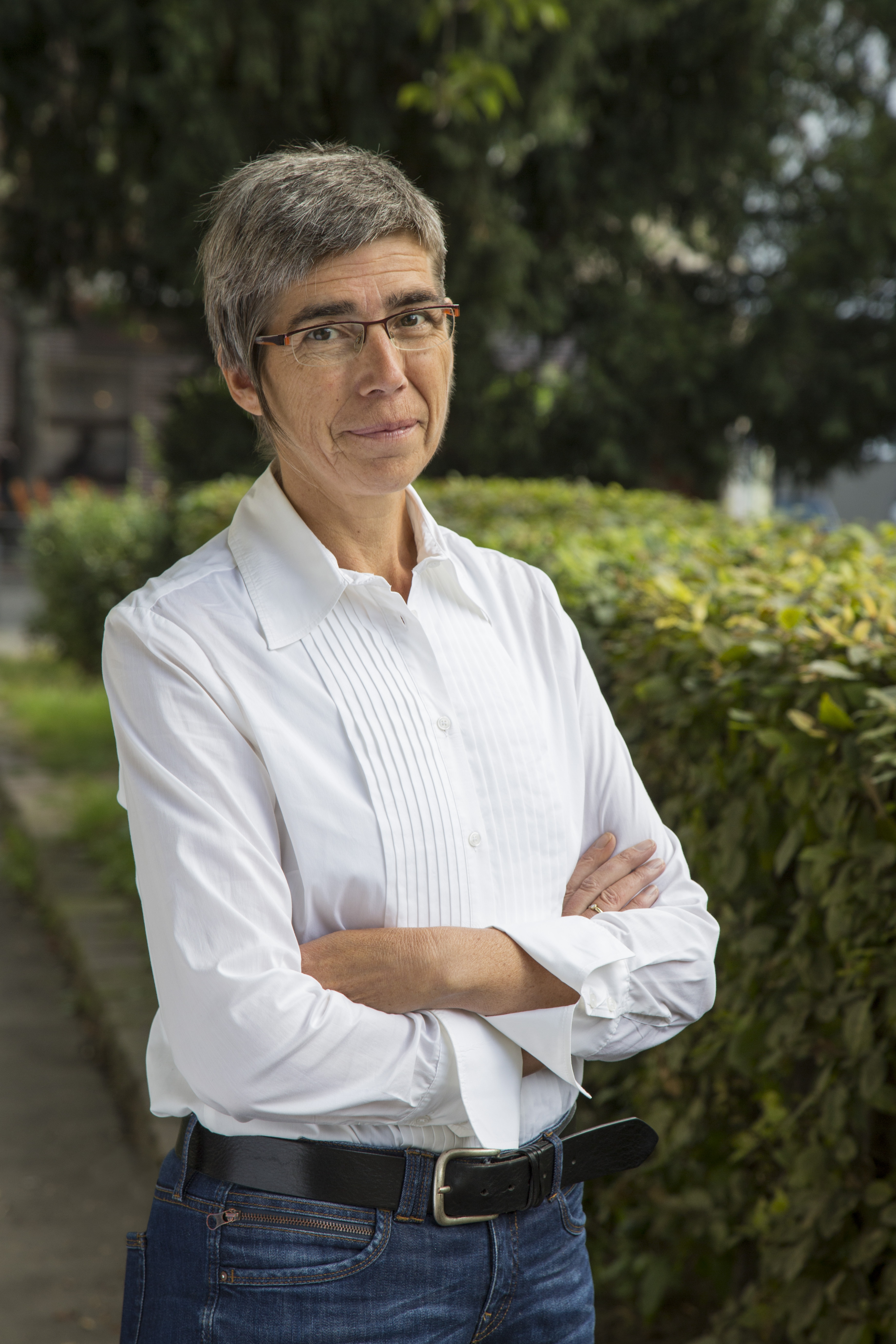 Jutta Paulus Pressefoto